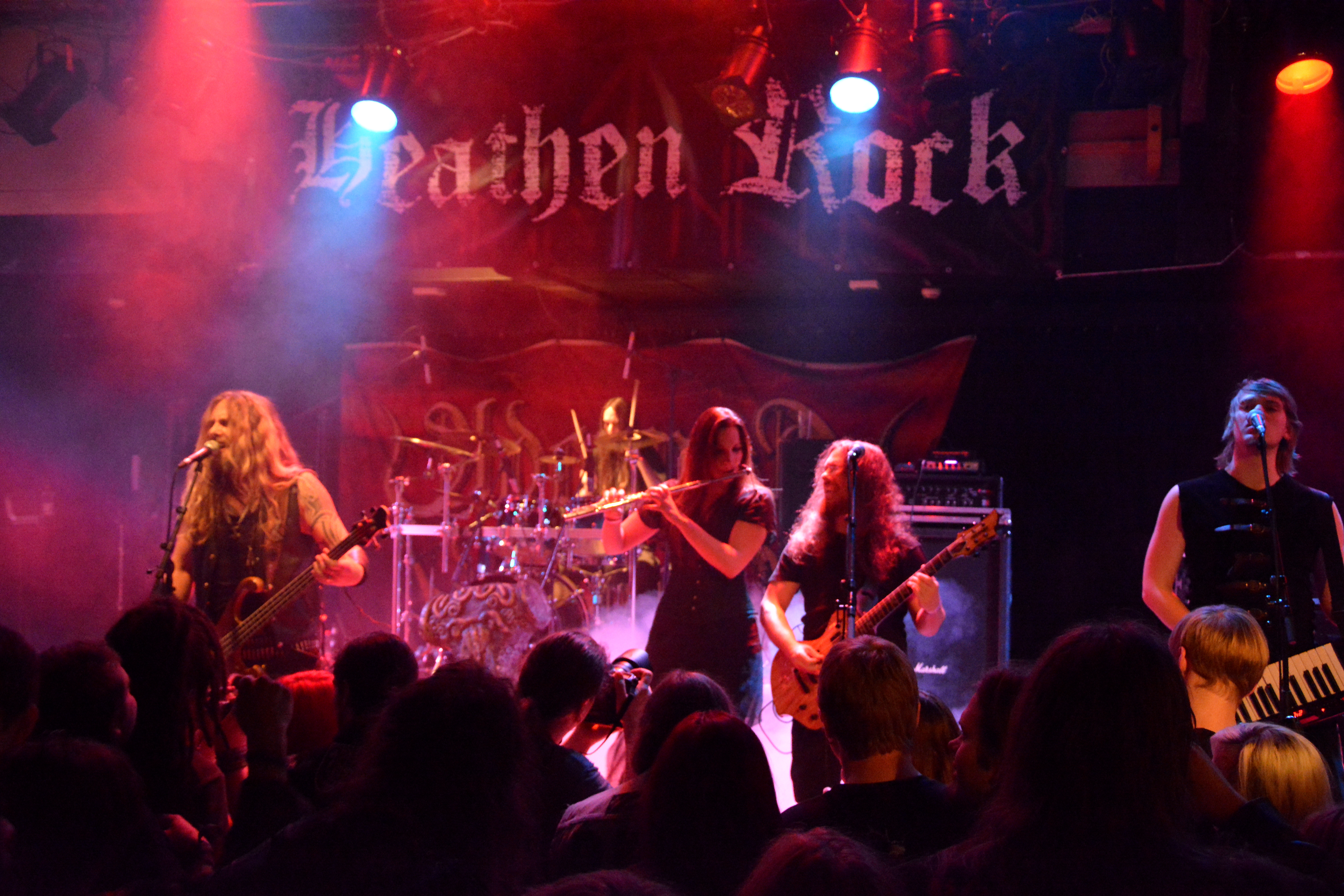 Adorned Brood beim Heathen Rock Festivals 2014 im Rieckhof in Hamburg-Harburg